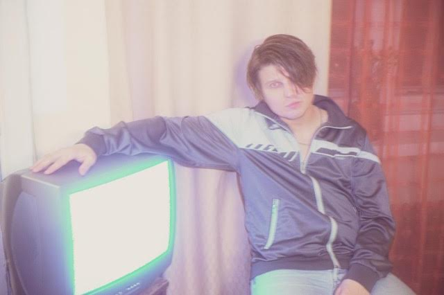 Markus Krunegård, Stockholm, 2018